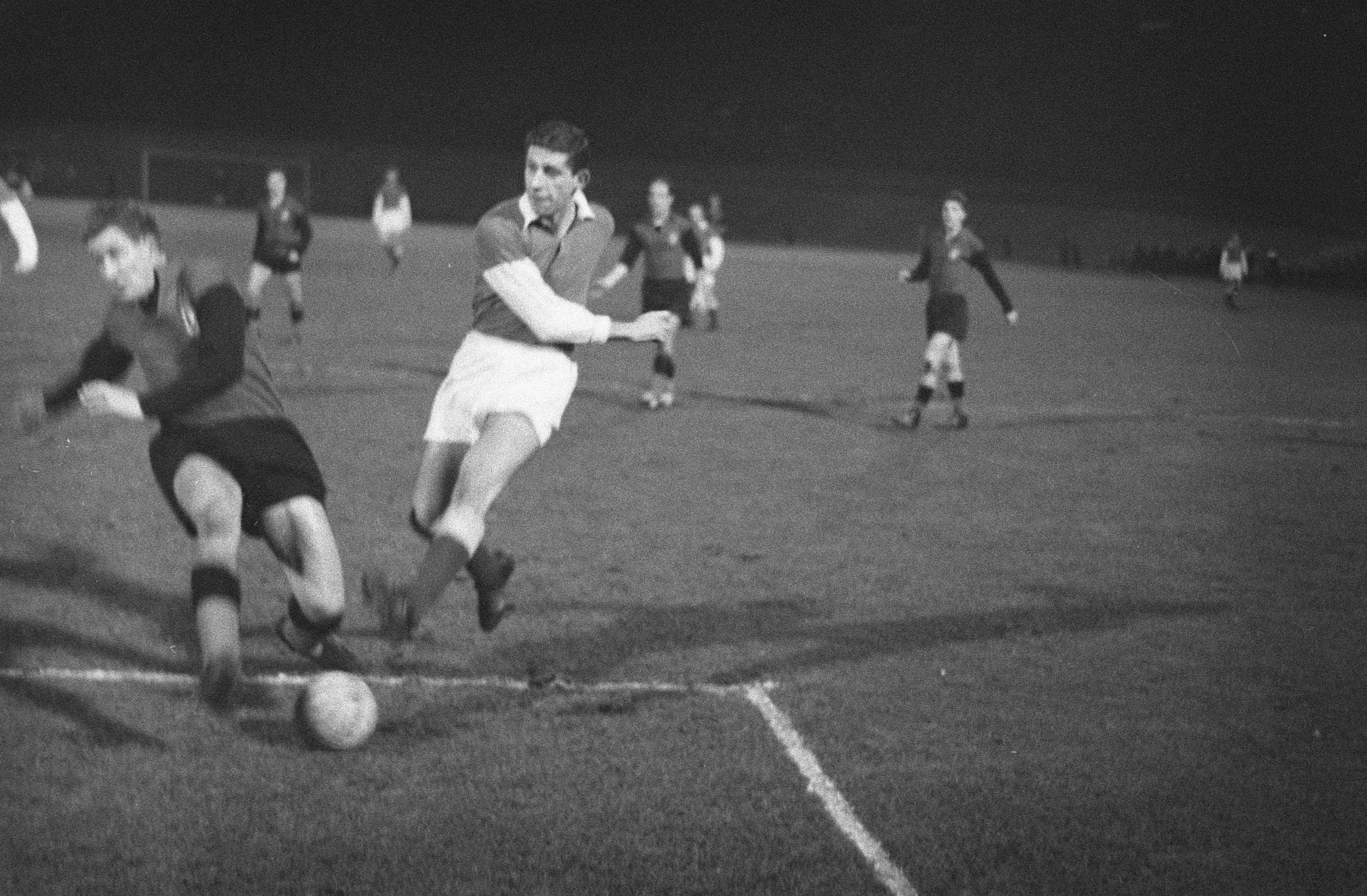 Collectie / Archief : Fotocollectie Anefo Reportage / Serie : [ onbekend ] Beschrijving : Voetbalwedstrijd tussen Amsterdams en Rotterdams elftal, Cor van der Gijp in actie Datum : 17 februari 1960 Locatie : Amsterdam, Noord-Holland Trefwoorden : sport, voetbal Persoonsnaam : Gijp, Cor van der Fotograaf : Pot, Harry / Anefo Auteursrechthebbende : Nationaal Archief Materiaalsoort : Negatief (zwart/wit) Nummer archiefinventaris : bekijk toegang 2.24.01.05 Bestanddeelnummer : 911-0361